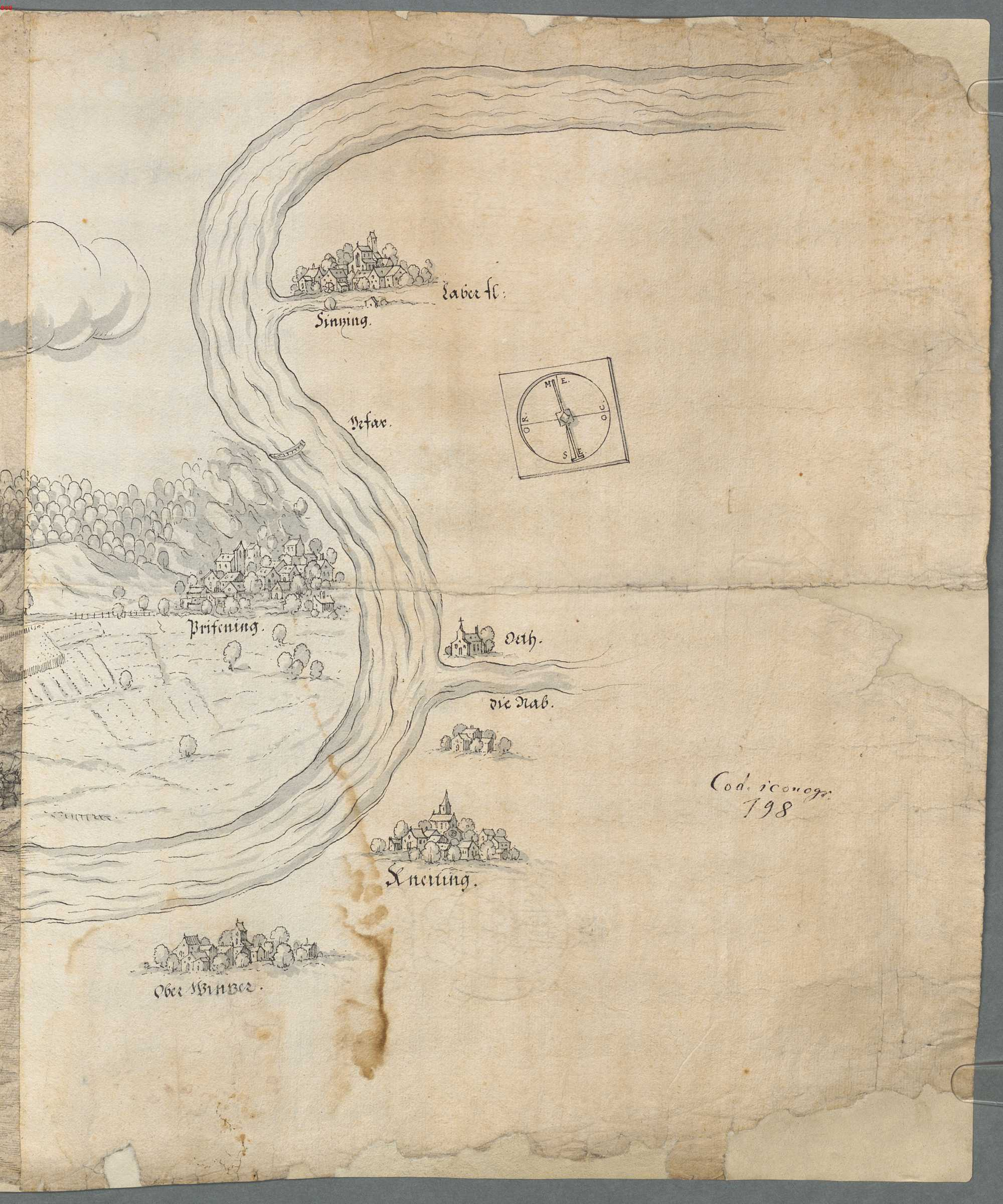 Abriß der Stadt Regensburg östlich und westlich der Steinernen Brücke. Bezeichnungen: Laber fl (Laaber Fluss), ?fax (Überfahrt?), Orth (Mariaort), Die Naab, Kneiting, Ober Winzer